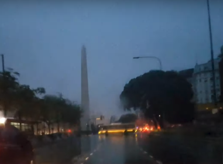 Apagón en el obelisco, tras el gran apagón entre Argentina, Brasil, Chile, Paraguay y Uruguay.